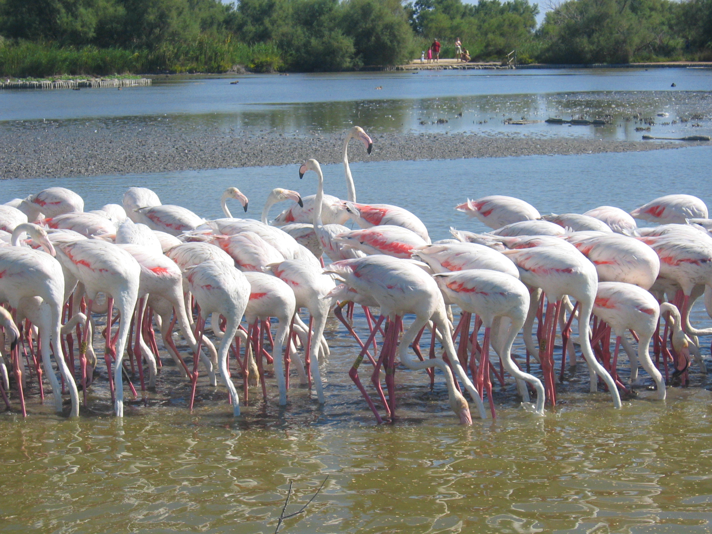 Flamants roses en Camargue